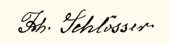 Unterschrift von Johann Schlösser (gestorben 1897), Kerzenfabrikant aus Köln